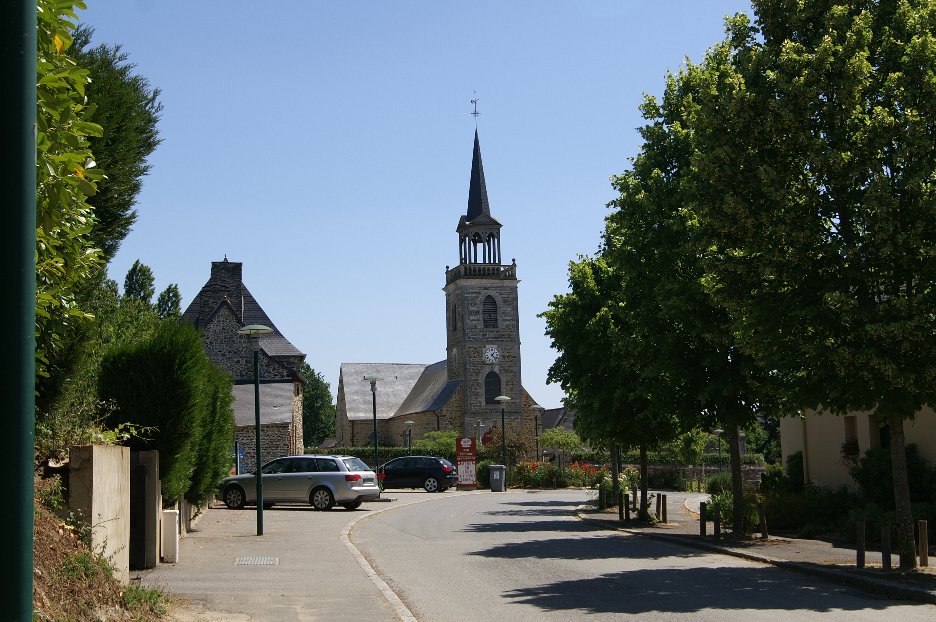 Centre-bourg de Saint-Aubin-du-Pavail.